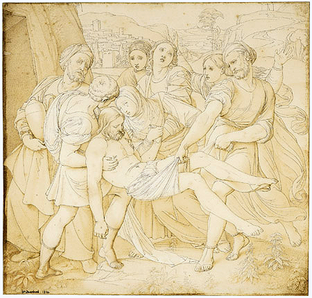 Friedrich Overbeck Entombment of Christ